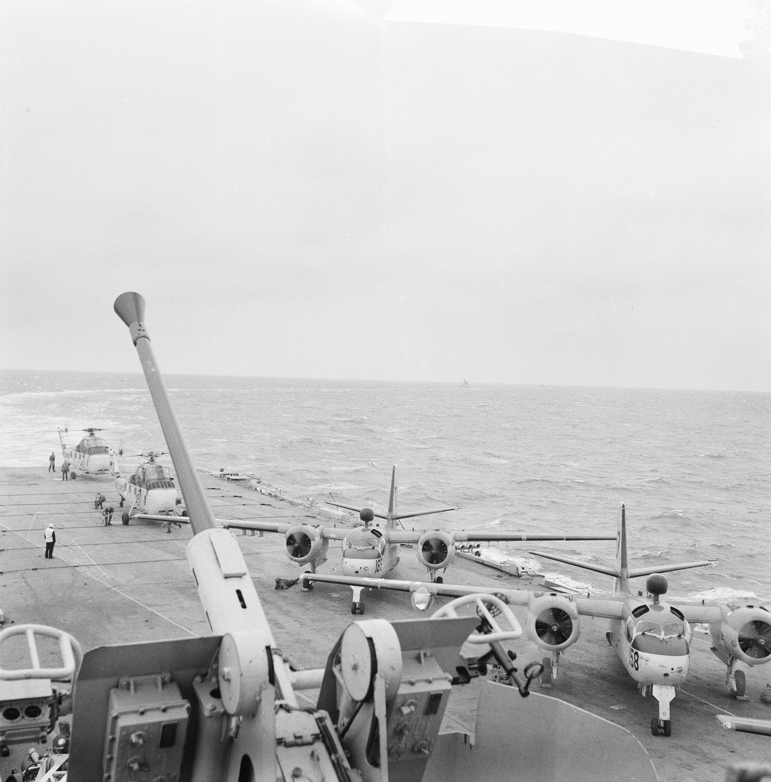 Collectie / Archief : Fotocollectie Anefo Reportage / Serie : [ onbekend ] Beschrijving : Reportage van vaartocht met Karel Doorman Datum : 8 juli 1962 Trefwoorden : SCHEPEN, VLIEGTUIGEN Fotograaf : Nijs, Jac. de / Anefo Auteursrechthebbende : Nationaal Archief Materiaalsoort : Negatief (zwart/wit) Nummer archiefinventaris : bekijk toegang 2.24.01.03 Bestanddeelnummer : 914-1130